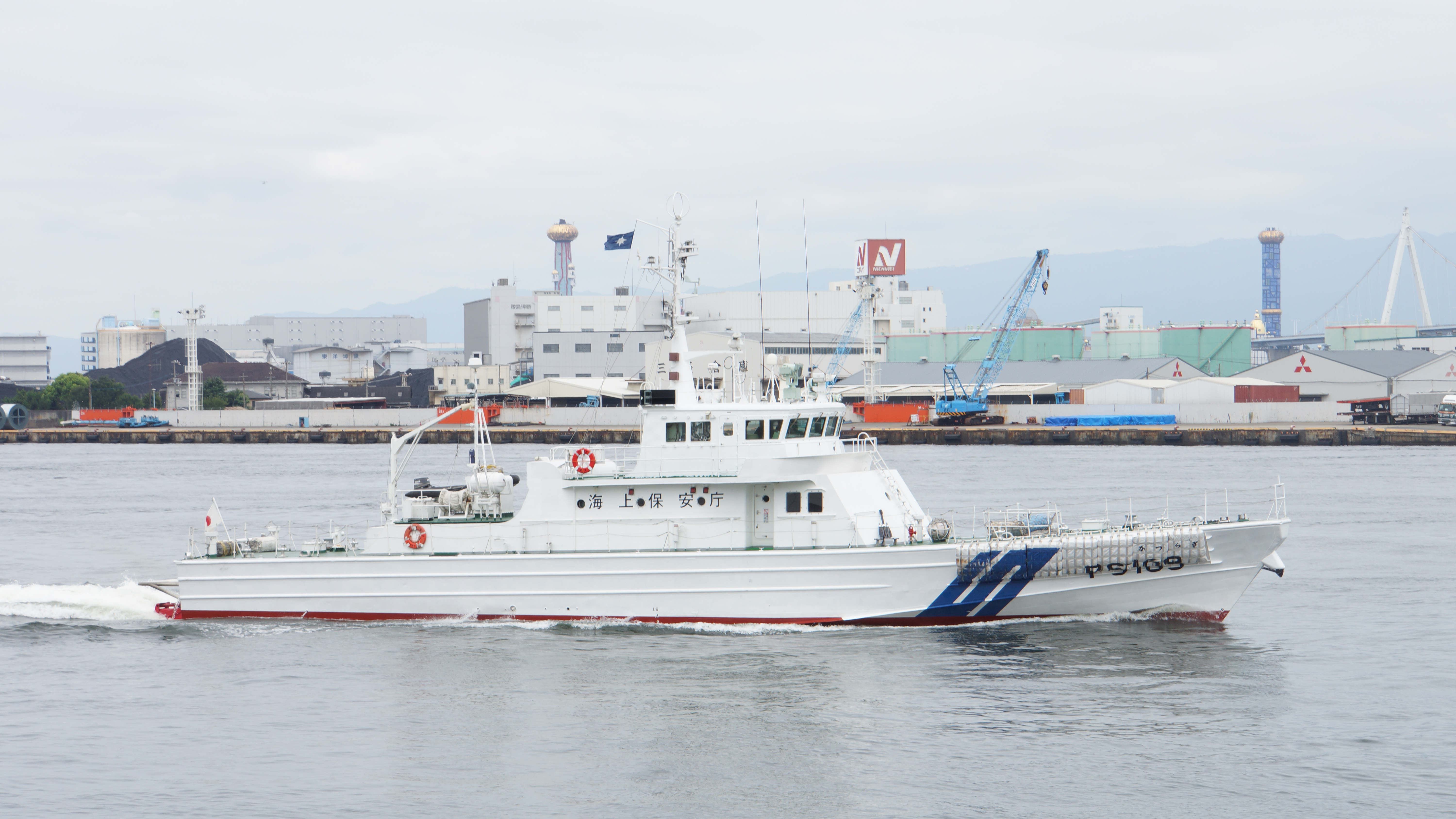 海上保安庁 巡視船かつらぎ（PS-109）。2016年7月24日 大阪港にて。